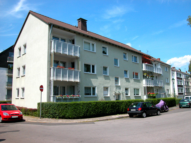 Die Straße «Balckestraße» in Benrath, Düsseldorf